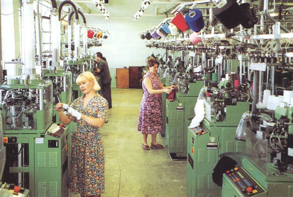 1998 год. Вязально-швейный цех